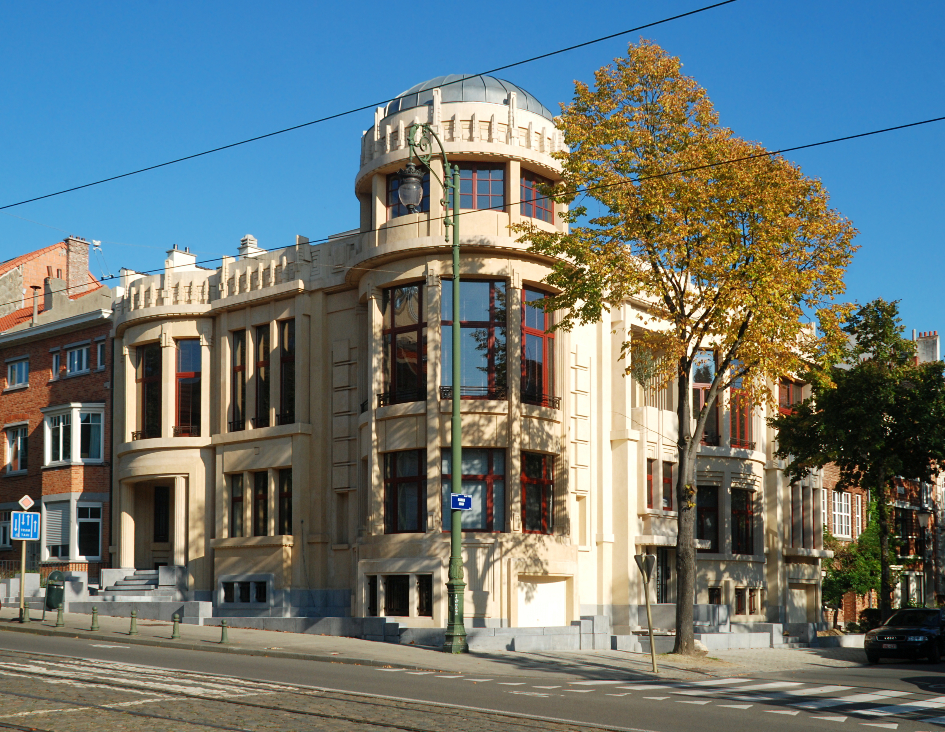 Belgique - Bruxelles - Uccle - Hôtel Haerens (Art déco - Antoine Courtens - 1928)